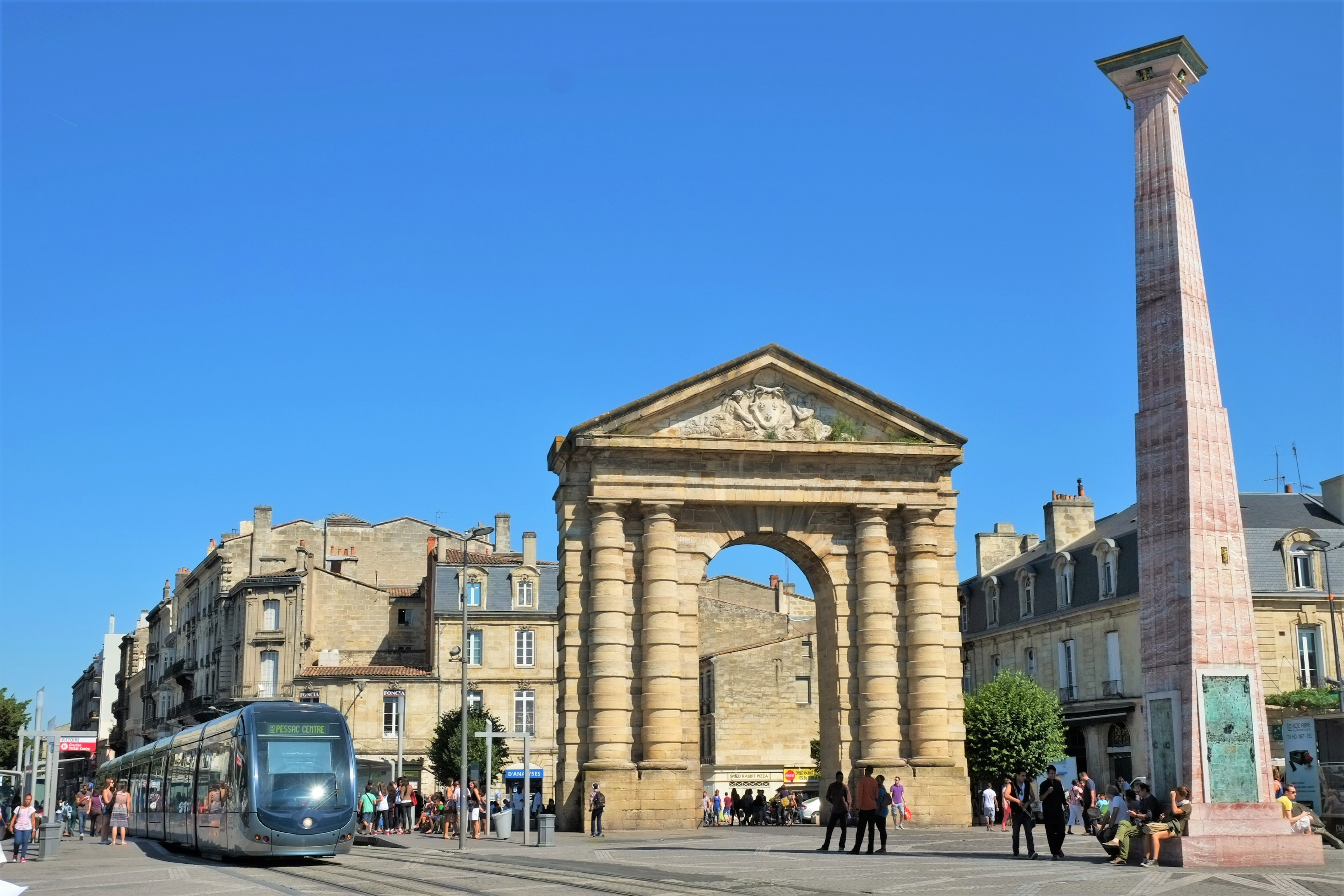 Place de la Victoire Bordeaux France